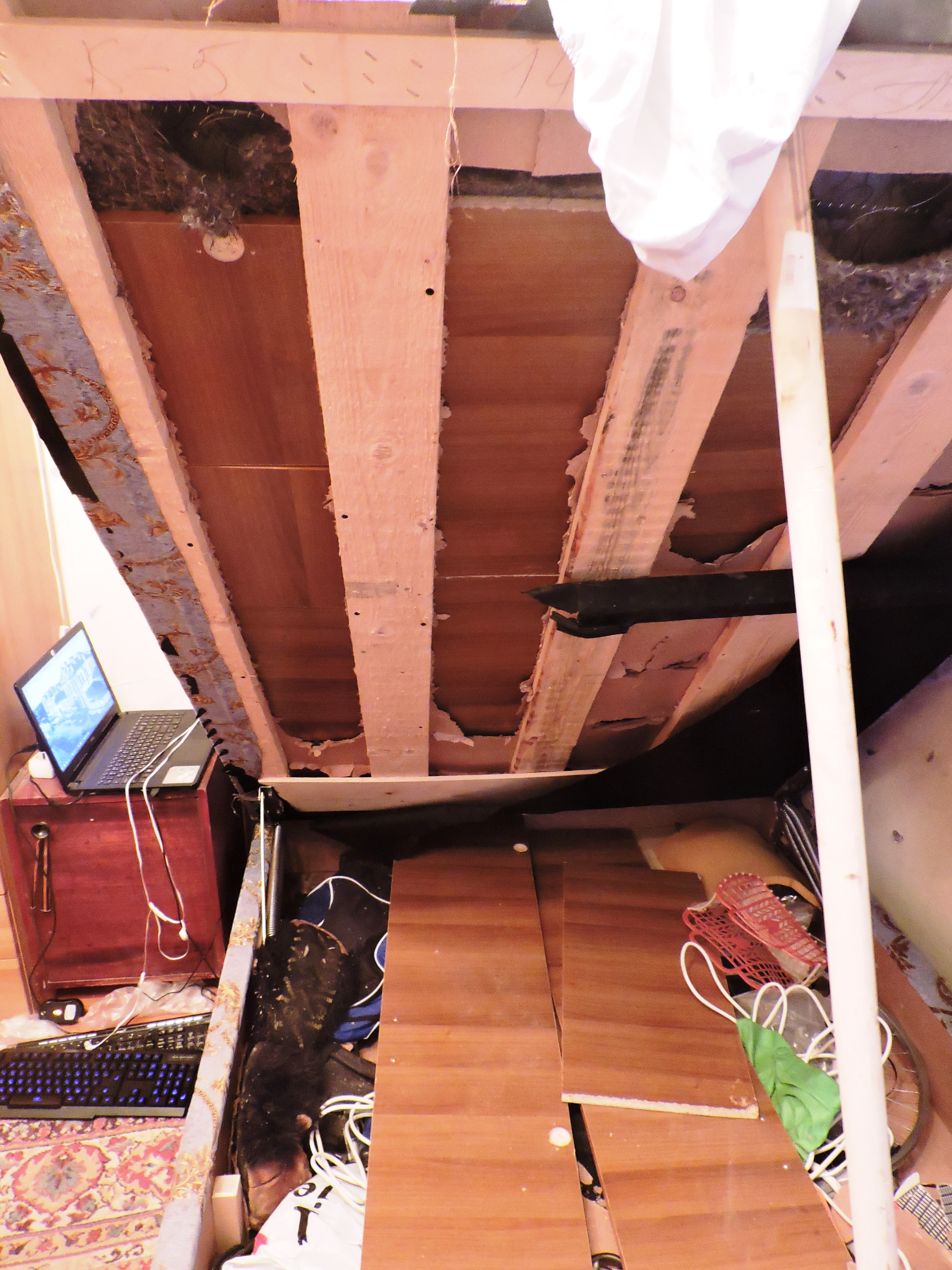 Бельевой ящик тахты часто используется для хранения никому не нужного хлама!